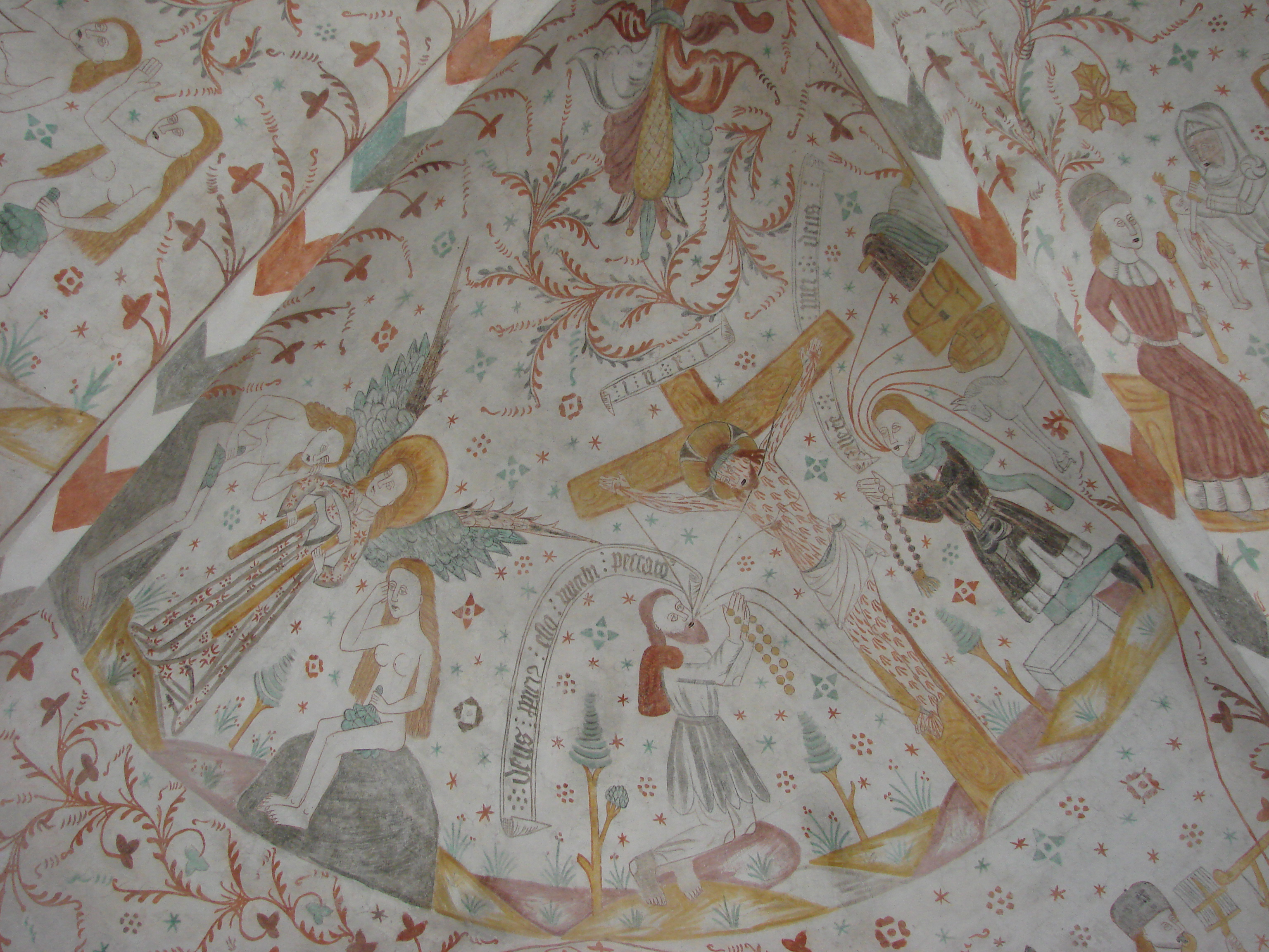 2008 09-07 09-08 Dänemark 239 Moen, Keldby